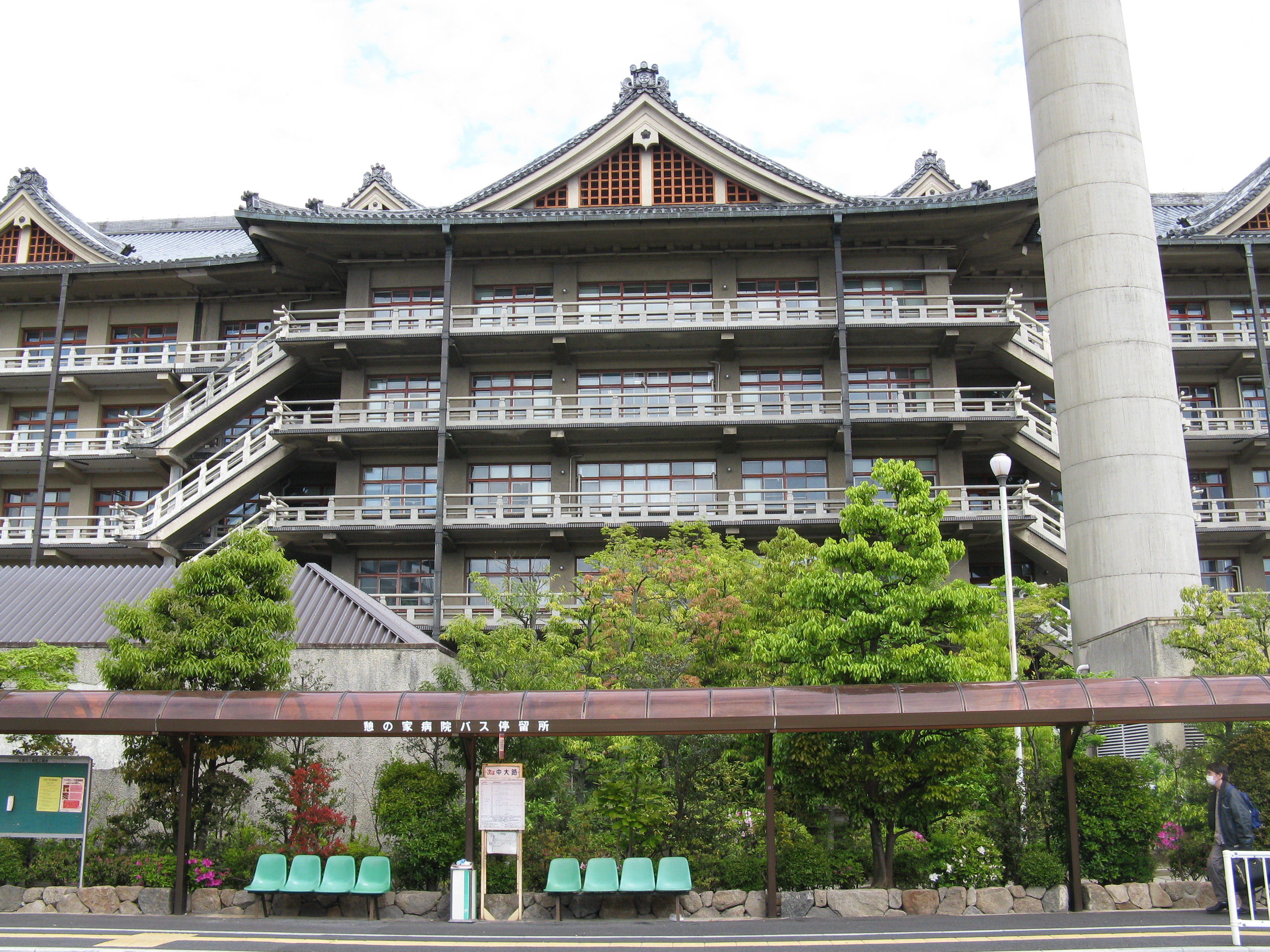 天理よろづ相談所病院